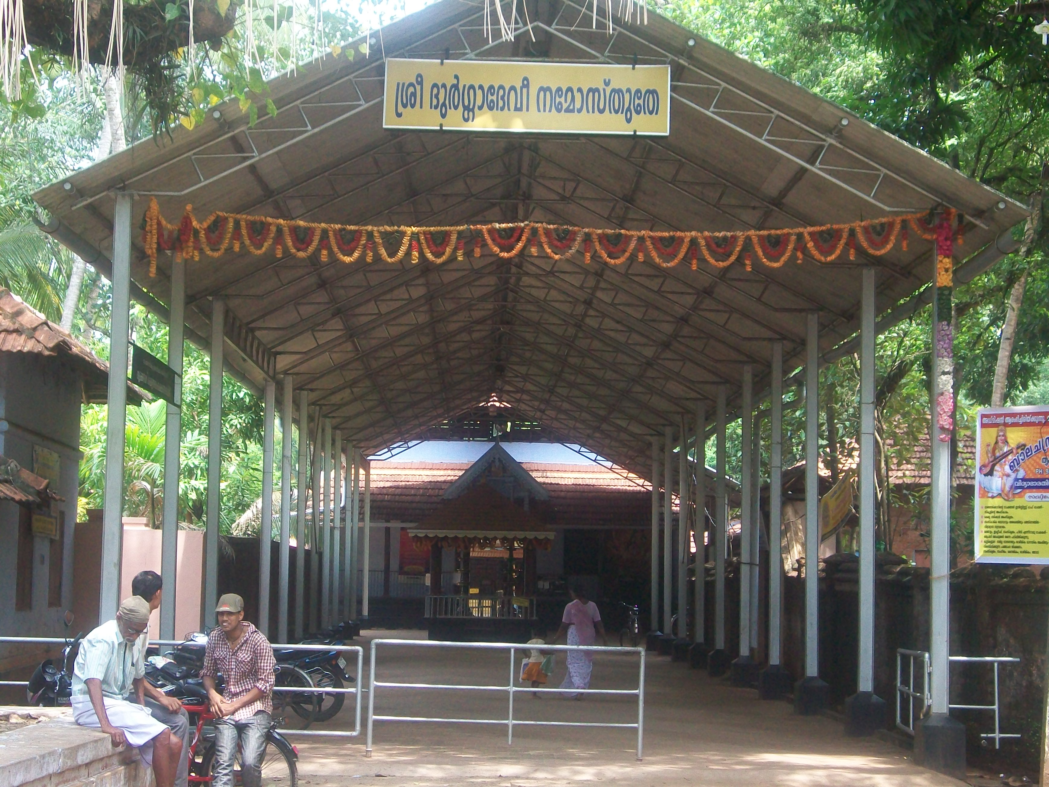 പൊന്നാനിയിലെ തൃക്കാവിലുള്ള ശ്രീദുർഗ്ഗ ഭഗവതി ക്ഷേത്രത്തിന്റെ കവാടം